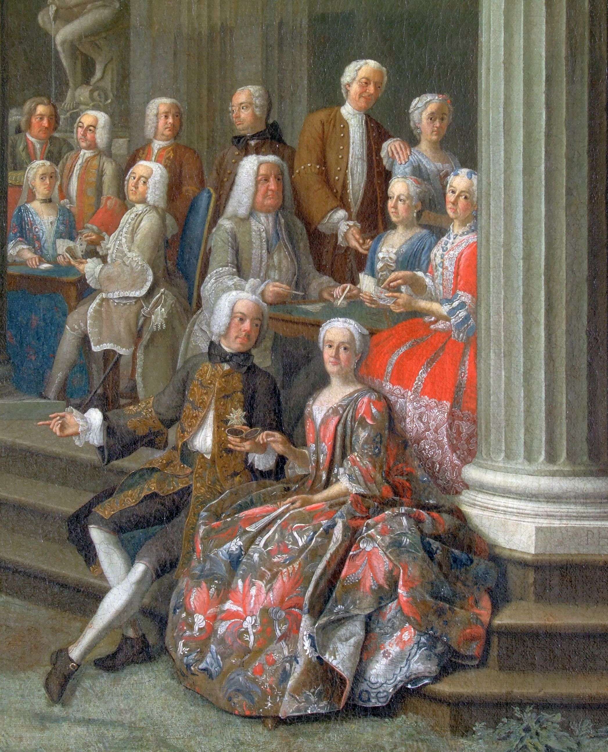 Hofkonzert in Schloß Ismaningtitle QS:P1476,de:"Hofkonzert in Schloß Ismaning" label QS:Lde,"Hofkonzert in Schloß Ismaning"